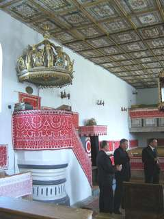 Körösfő református temploma